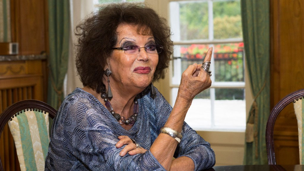 Claudia Cardinale a CineFest Fesztiválon (Miskolci Nemzetközi Filmfesztivál)